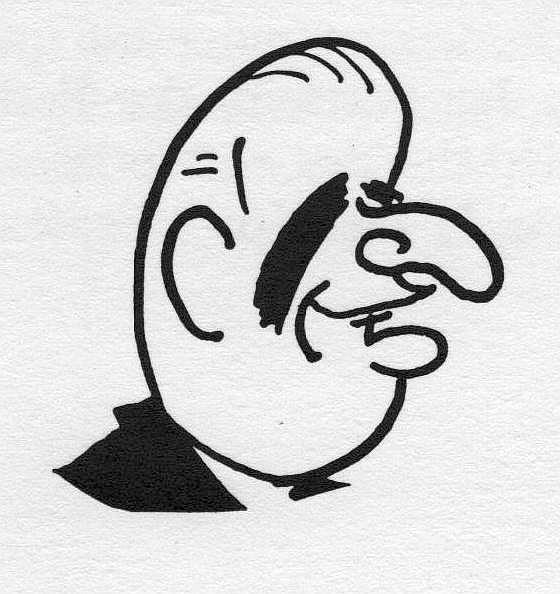 recueil de dessins et caricatures paru en 1980